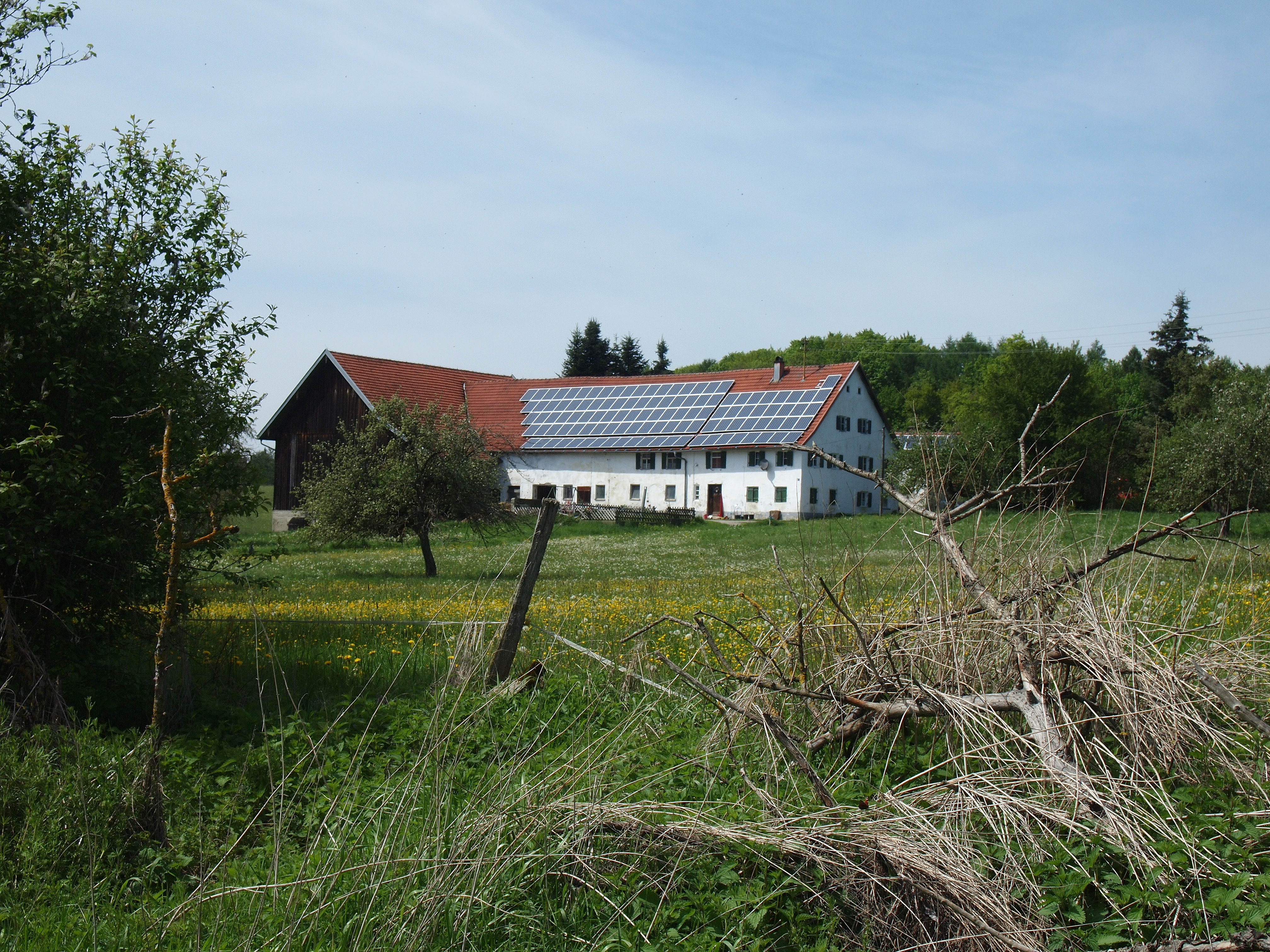 Ettringen (Wertach), Ortsteil Ziegelstadel